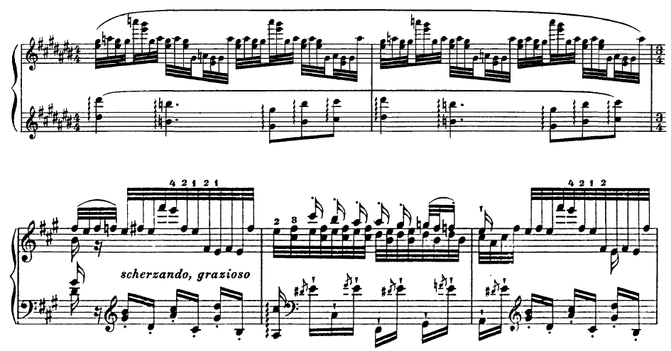 Ondine Feux-follets - indetermination sur 3 octaves